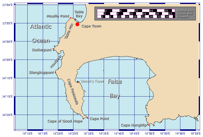 Mapa del cabo de Buena Esperanza A map showing the Cape Peninsula in South Africa, including the Cape of Good Hope and Cape Point.